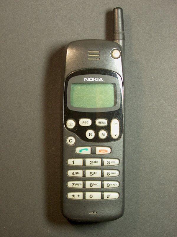 Nokia 1610